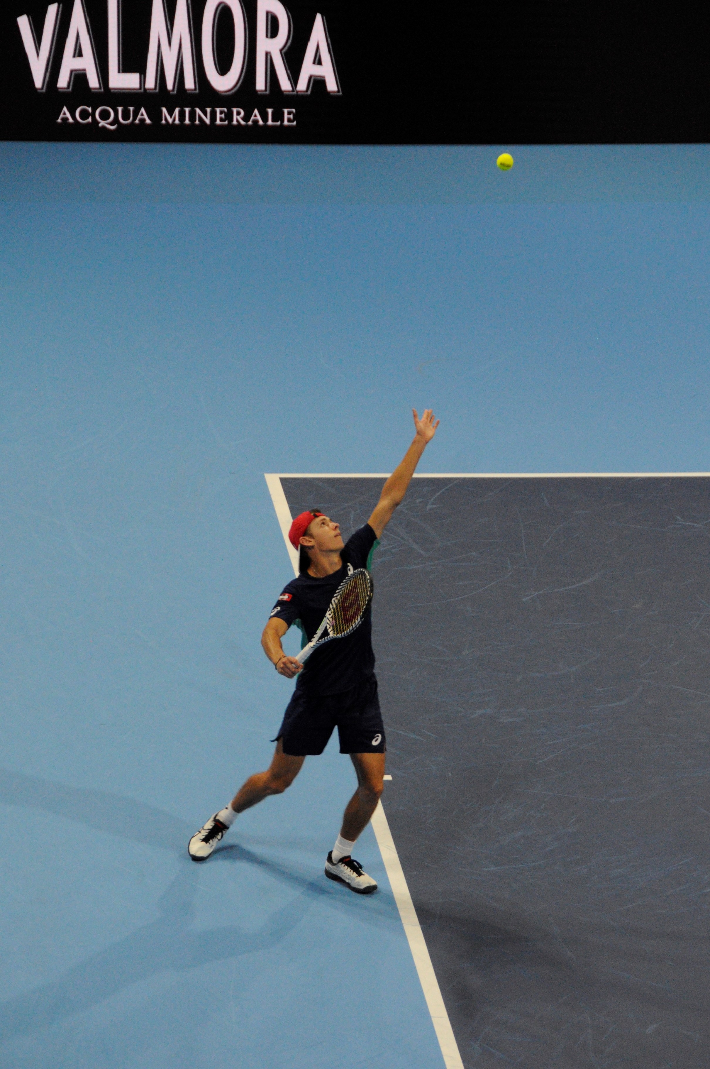 Alex de Minaur al servizio durante il torneo NextGen ATP Finals tenutosi a Milano nel 2019.